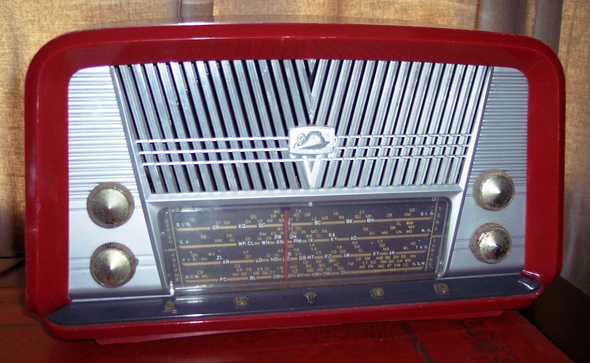 Astor BPJ 5 valve, 1959